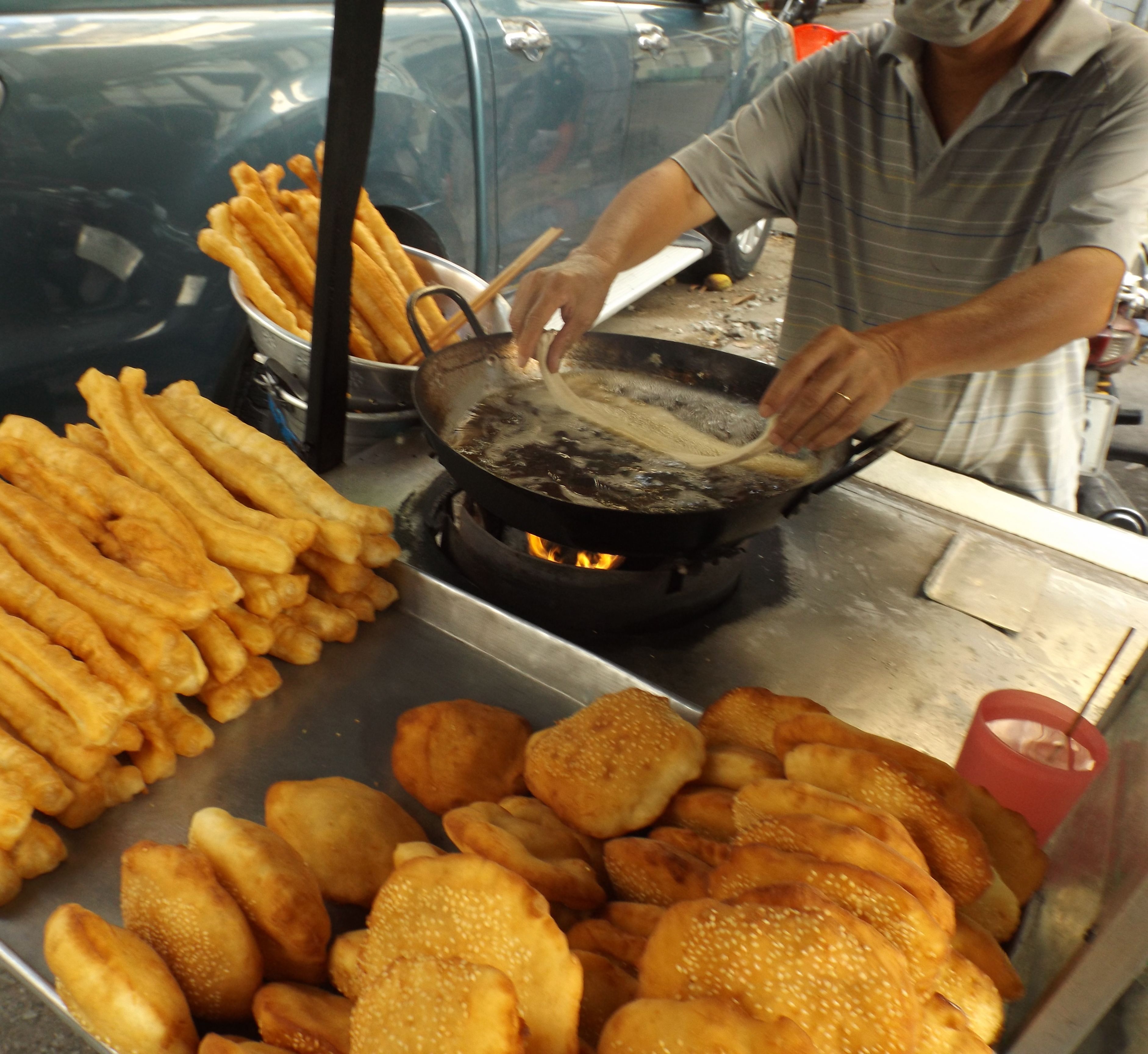 Friture de dầu cháo quẫy à Saigon